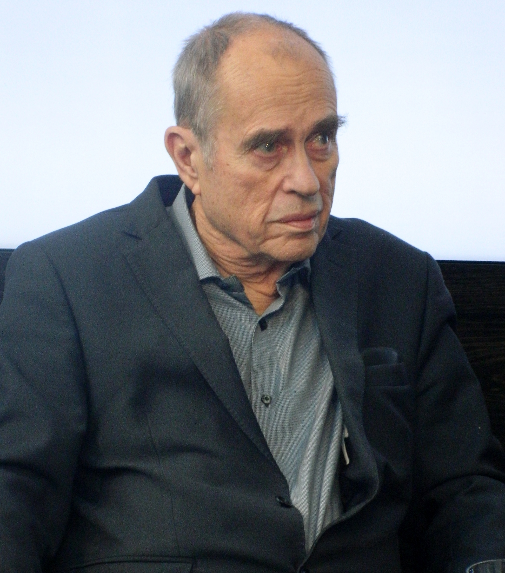 Kirjailija Jörn Donner Sanomatalon Mediatorilla 6. marraskuuta vuonna 2015